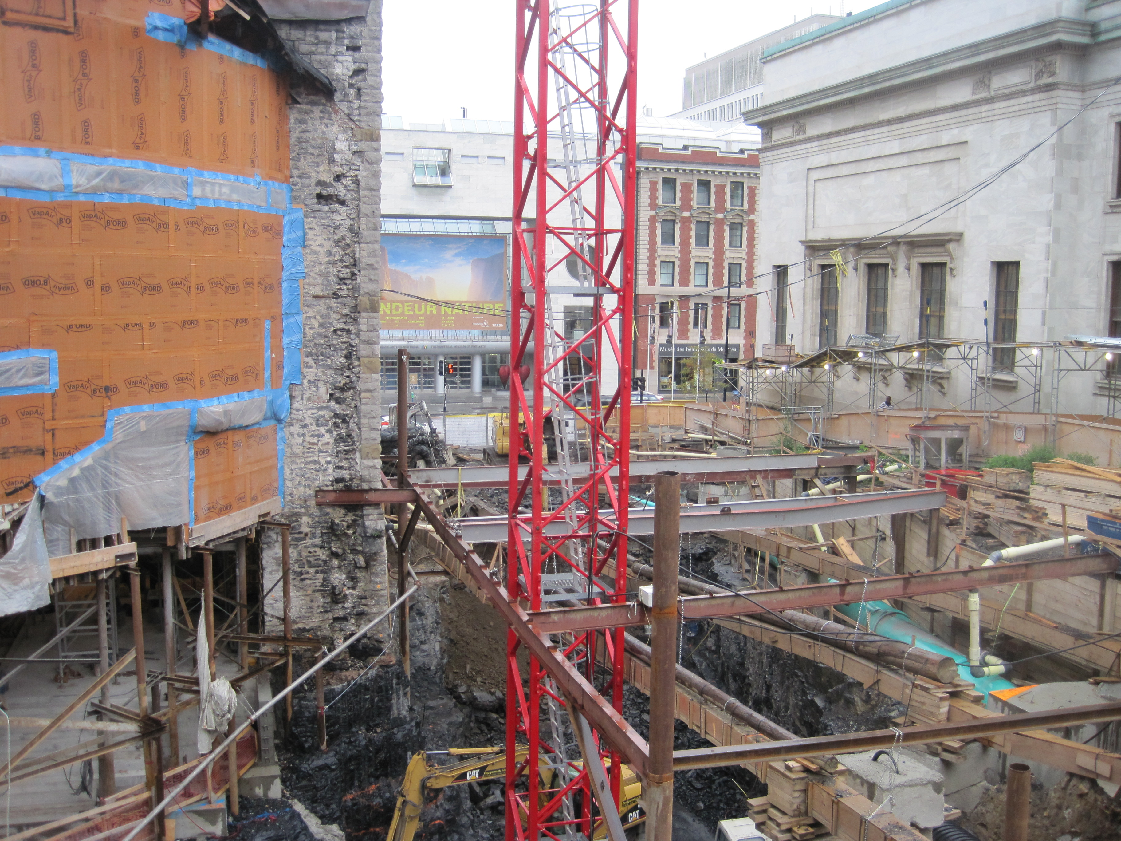 Construction de la galerie souterraine (rue du Musée au nord de la rue Sherbrooke) qui rejoindra l'actuel Musée des beaux-arts à l'église Erskine and American. Cette église deviendra un pavillon du Musée en 2011.